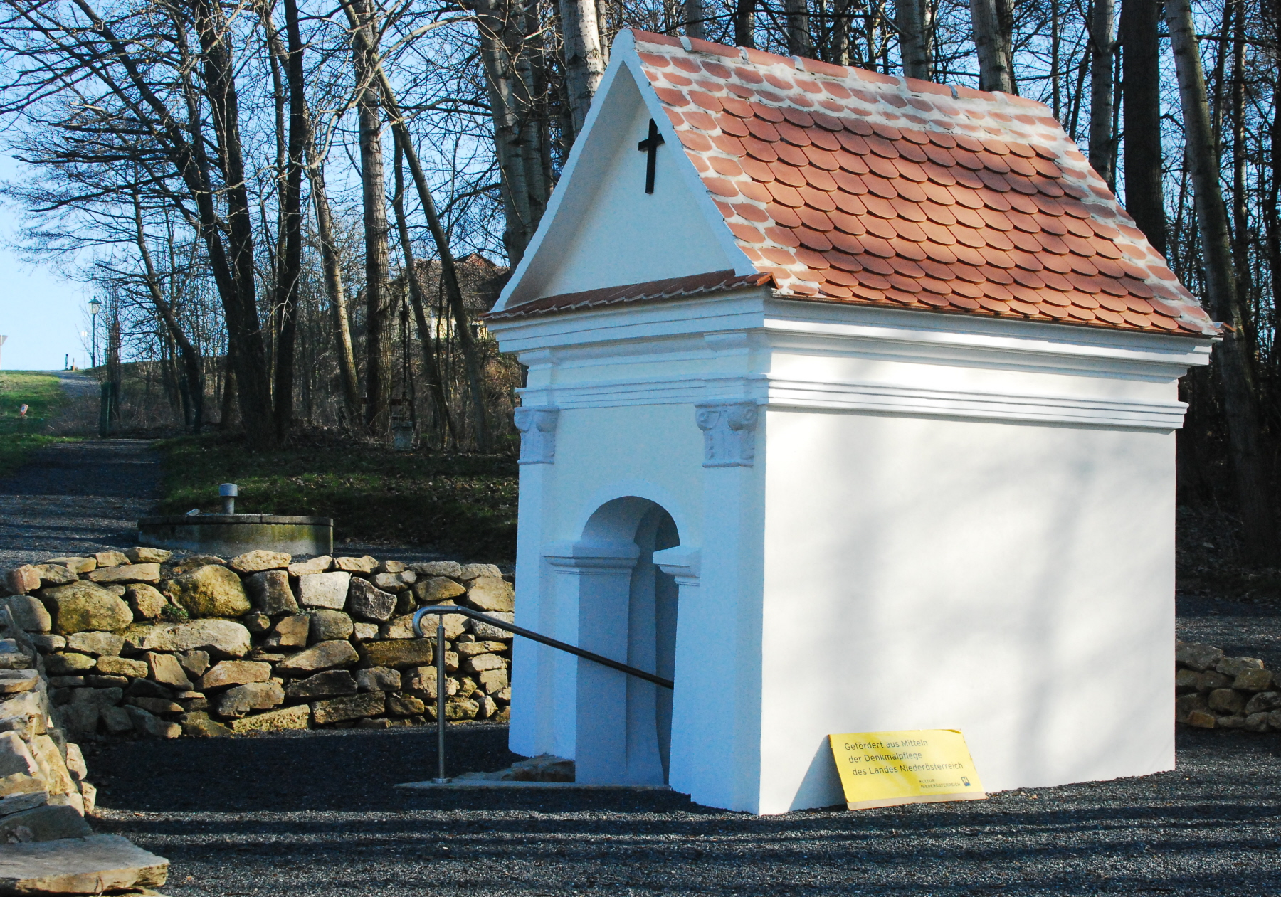 Das Bründl der Wallfahrtskirche Maria im Gebirge in Sallapulka in Niederösterreich